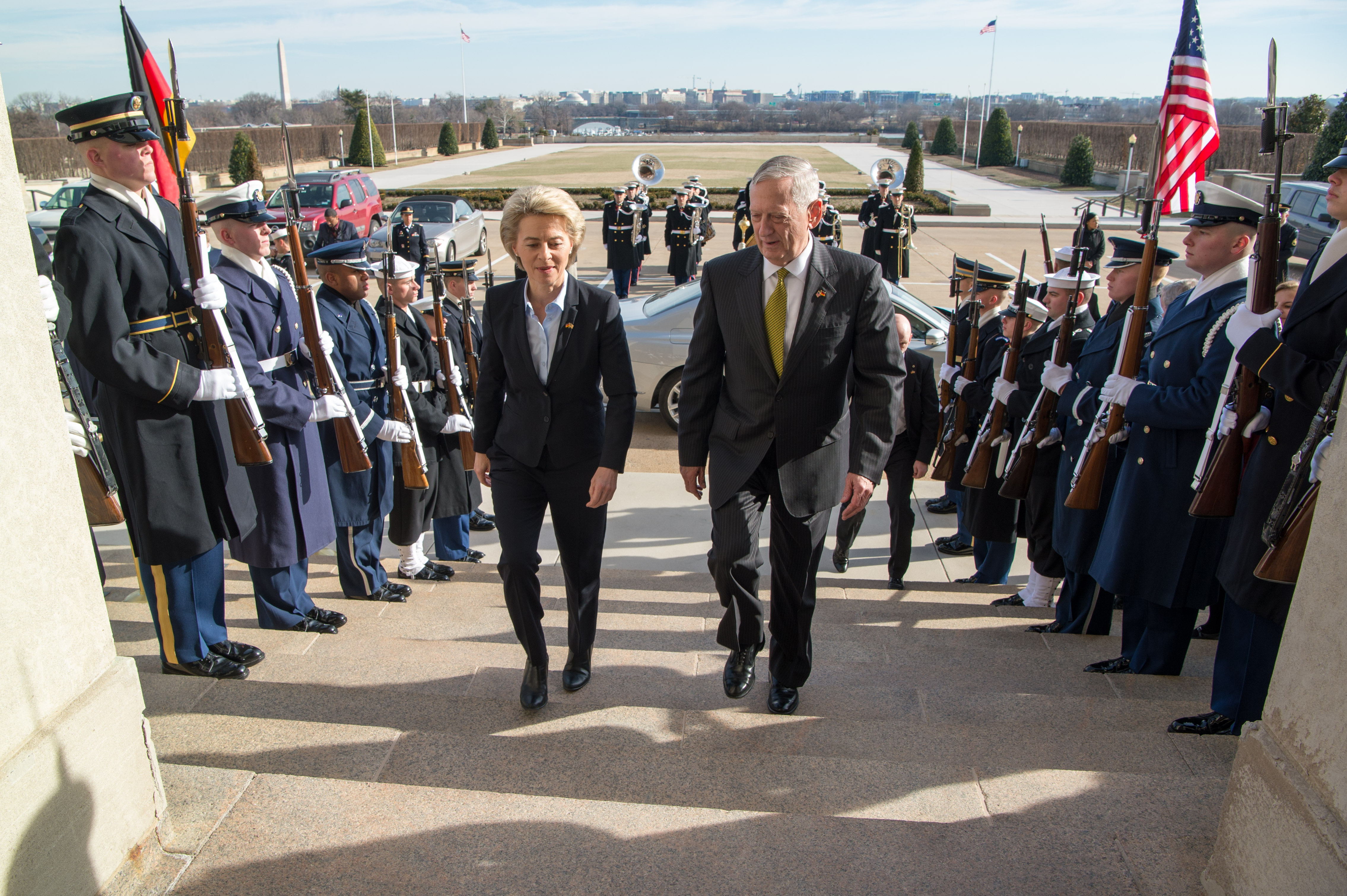 Treffen des US-Verteidigungsministers James N. Mattis mit der deutschen Bundesverteidigungsministerin Ursula von der Leyen im Pentagon in Washington, D.C.